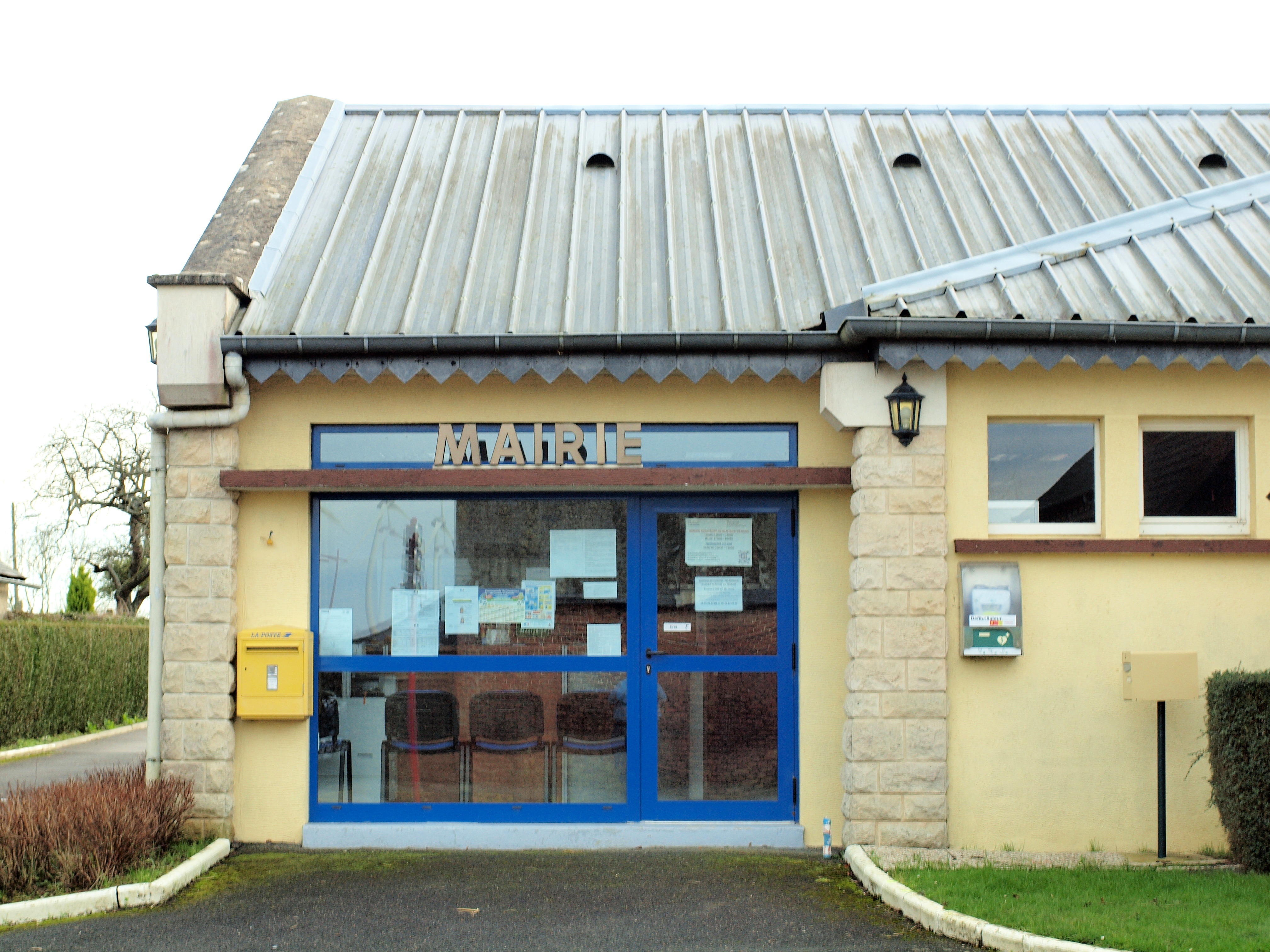 Criquiers ( Seine-Maritime, Normandie, France)